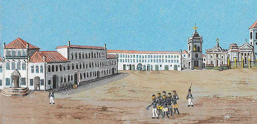 Carmo Square in colonial Rio de Janeiro, Brazil (detail).